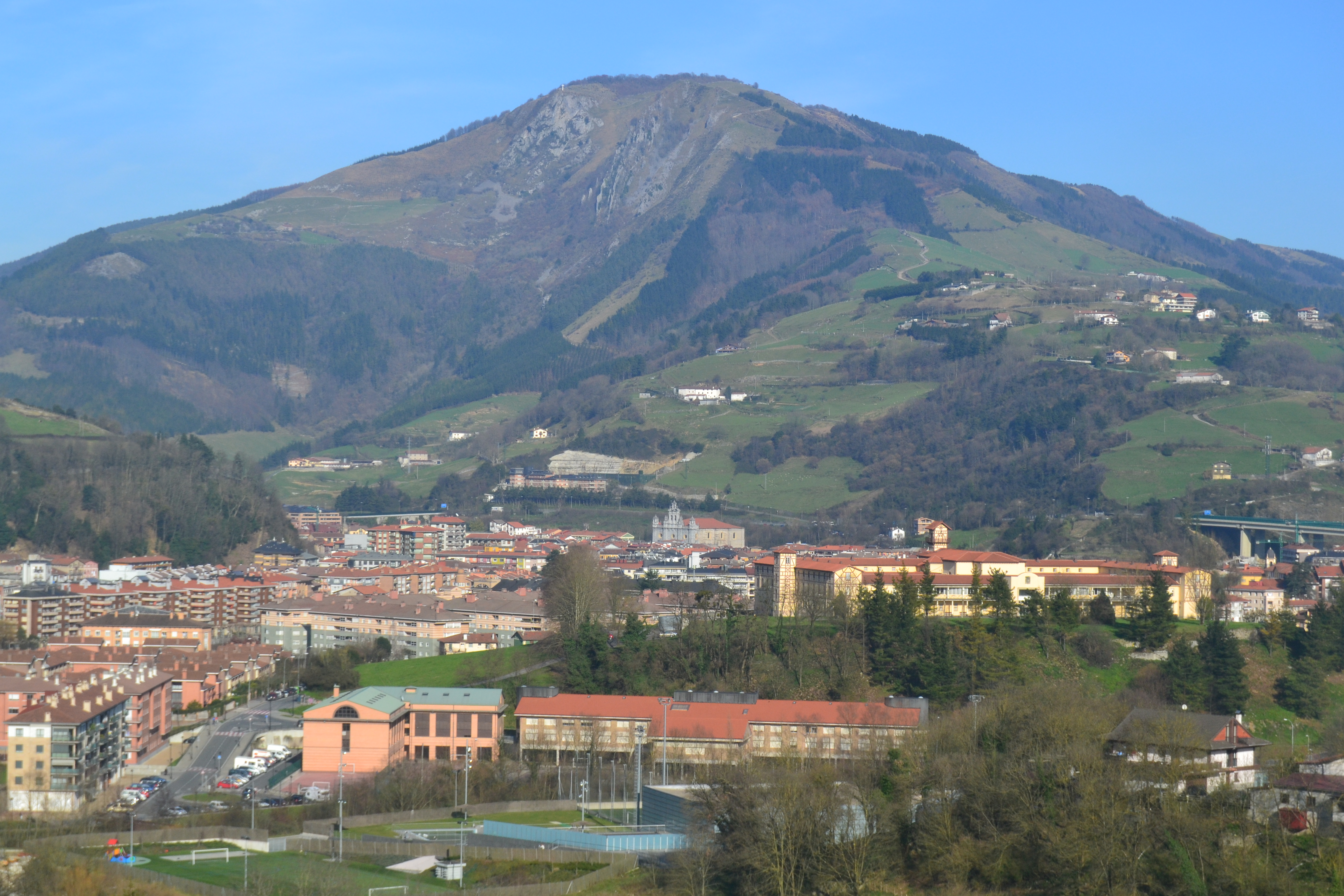 Tolosa eta Uzturre mendia. Gipuzkoa, Euskal Herria. Tolosa and Uzturre mountain. Gipuzkoa, Basque Country.